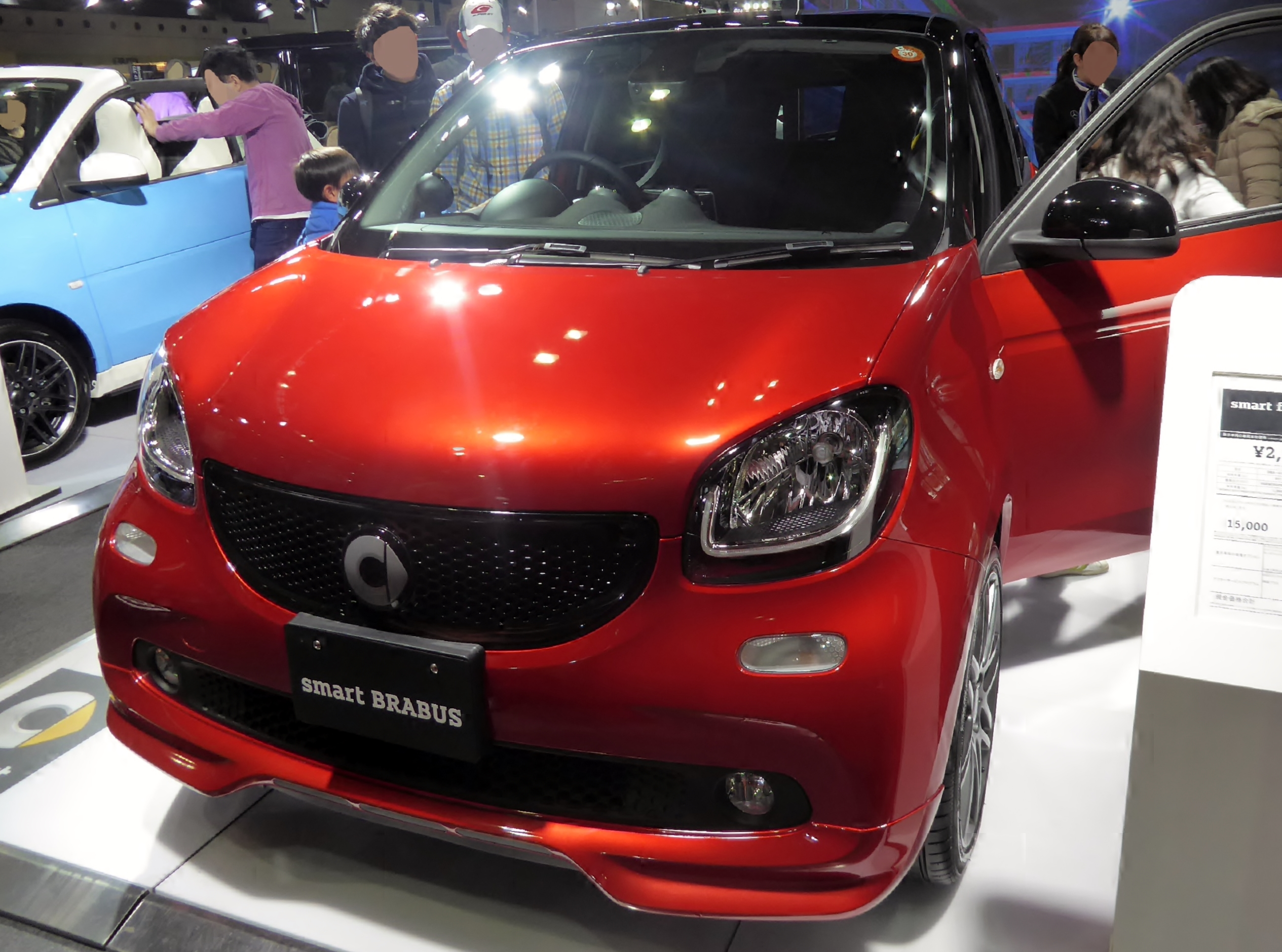 大阪モーターショー2017に於いてDBA-453044型スマートフォーフォーブラバススポーツを撮影。